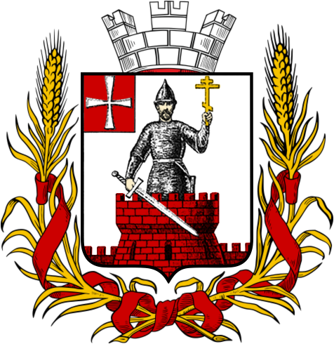 Герб Луцка 1911 года